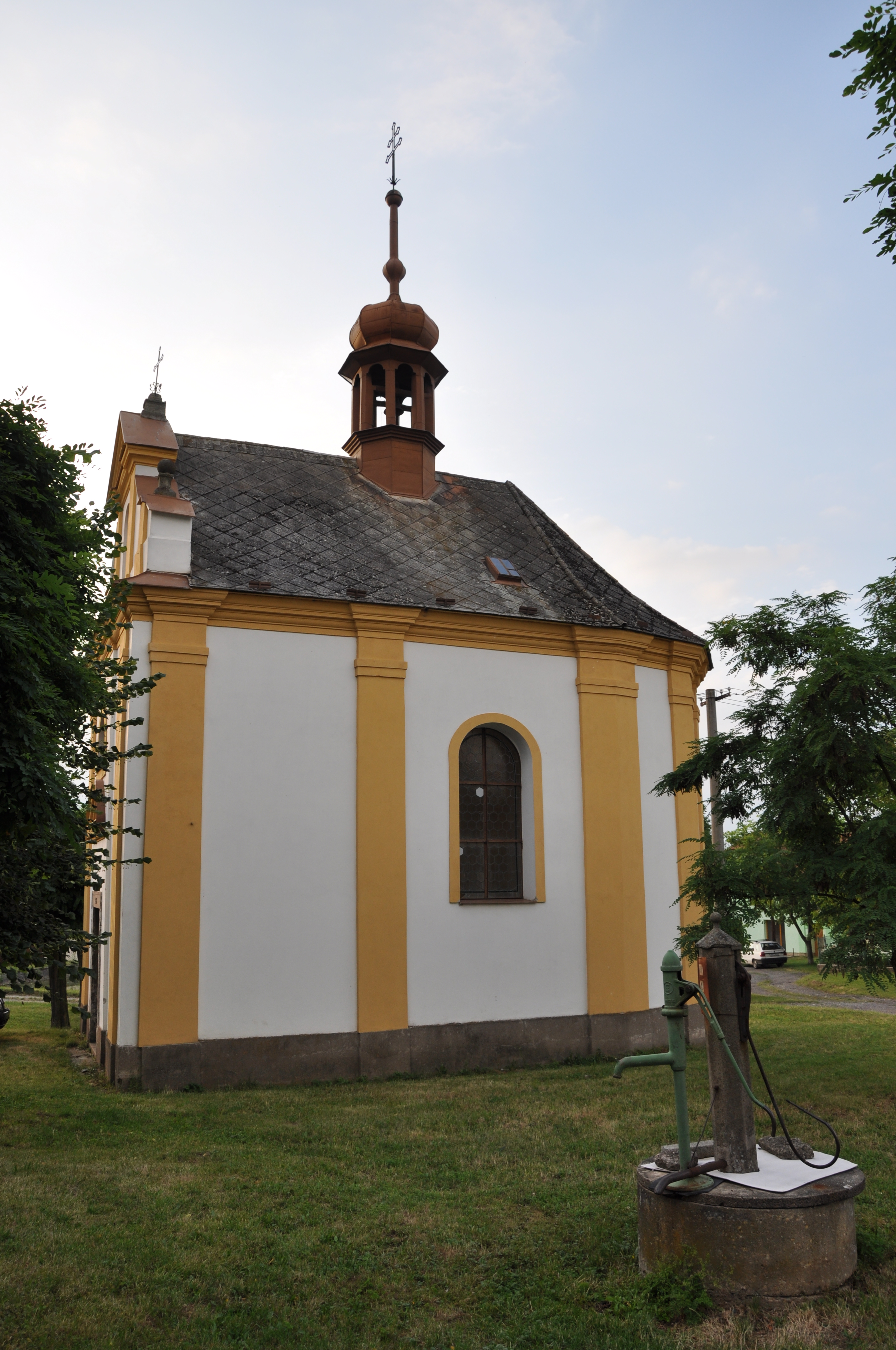 Česky: Luže-Dobrkov, okres Chrudim. Kaple.